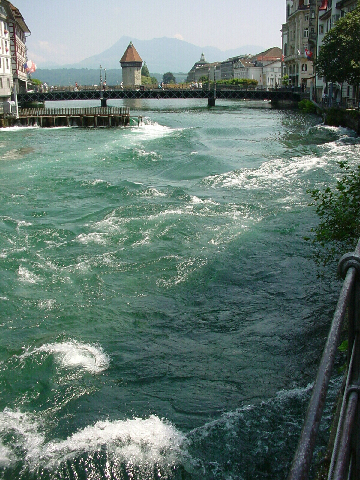 Die Reuss in Luzern bei hohem Wasserstand. Im Hintergrund die Kapellbrücke.